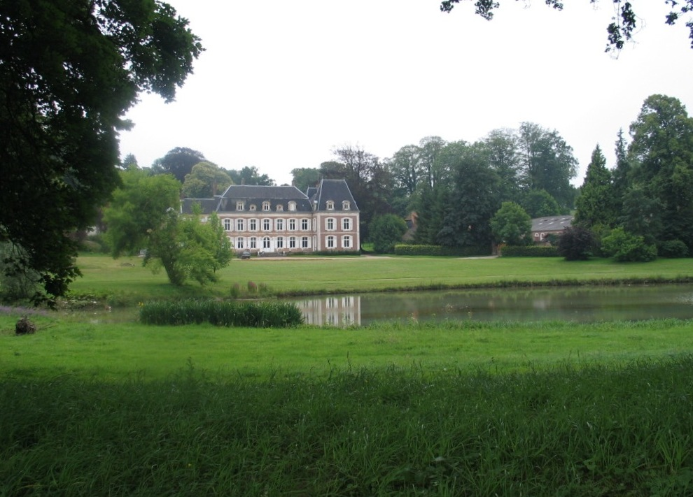 kasteel van Verchin, Frankrijk